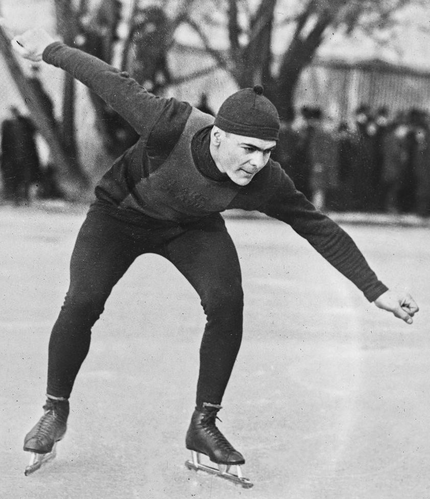 Charles Jewtraw [patineur de vitesse américain] (Keystone) : [photographie de presse] / [Agence Rol]